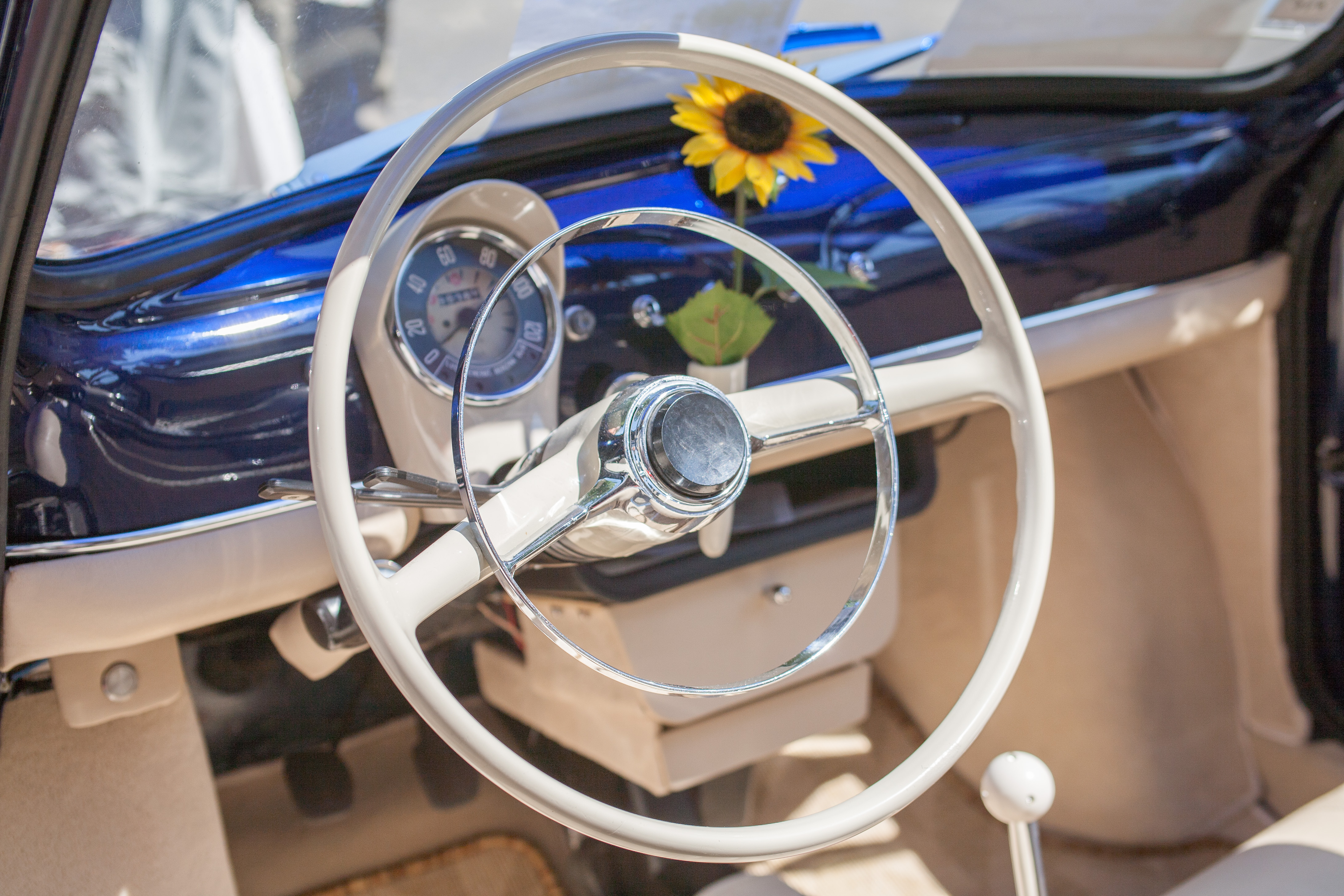 Rheinbach Classics 2007 – Lenkrad und Armaturenbrett eines Fiat Nuova 500 (Fiat 500 F), Baujahr 1971